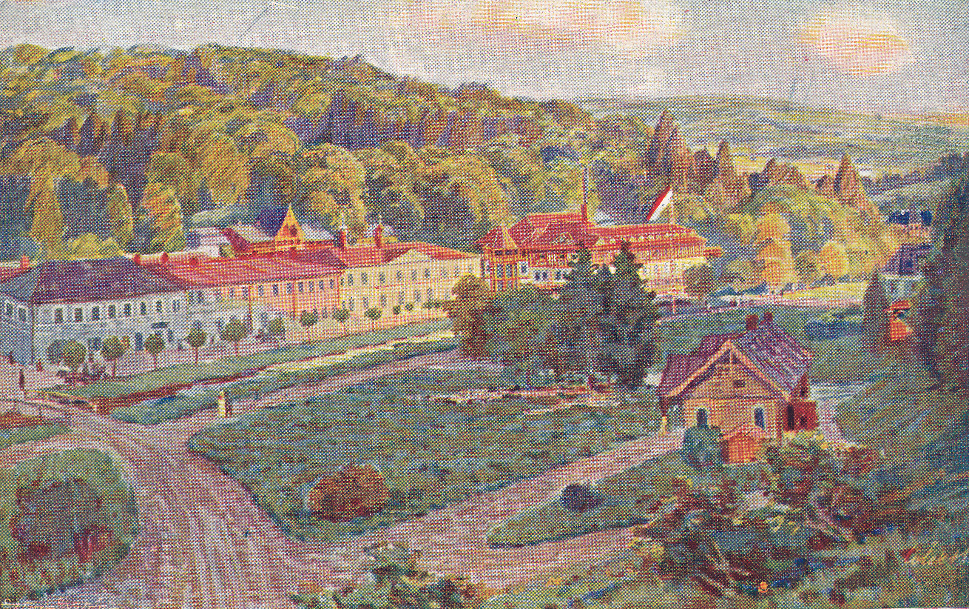 Stanislav Lolek: Lázně Luhačovice, pohlednice, obraz Stanislava Lolka, pohlednice prošlá poštou 1917